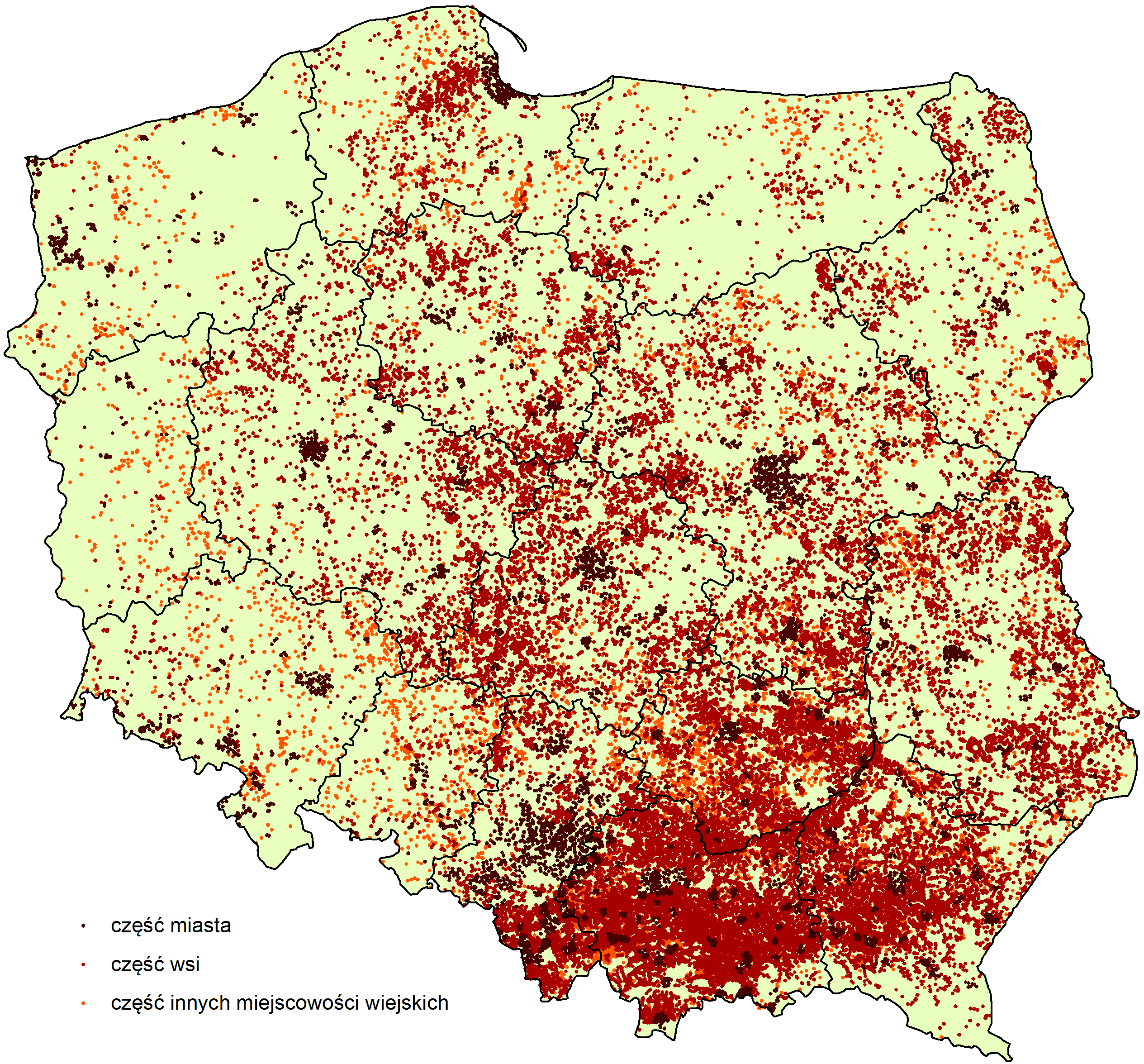 Urzędowo nazwane części miejscowości w Polsce – na podstawie Państwowego Rejestru Nazw Geograficznych wg stanu na 2016-01-18